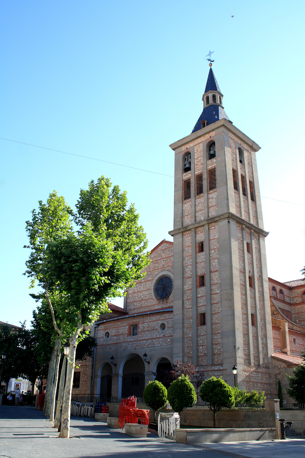 Iglesia de Nuestra Señora de la Asunción, inaugurada en 1958 tras ser destruida la anterior ,del siglo XVI, durante la Guerra Civil Campo de Criptana Provincia de Ciudad Real Castilla la Mancha España